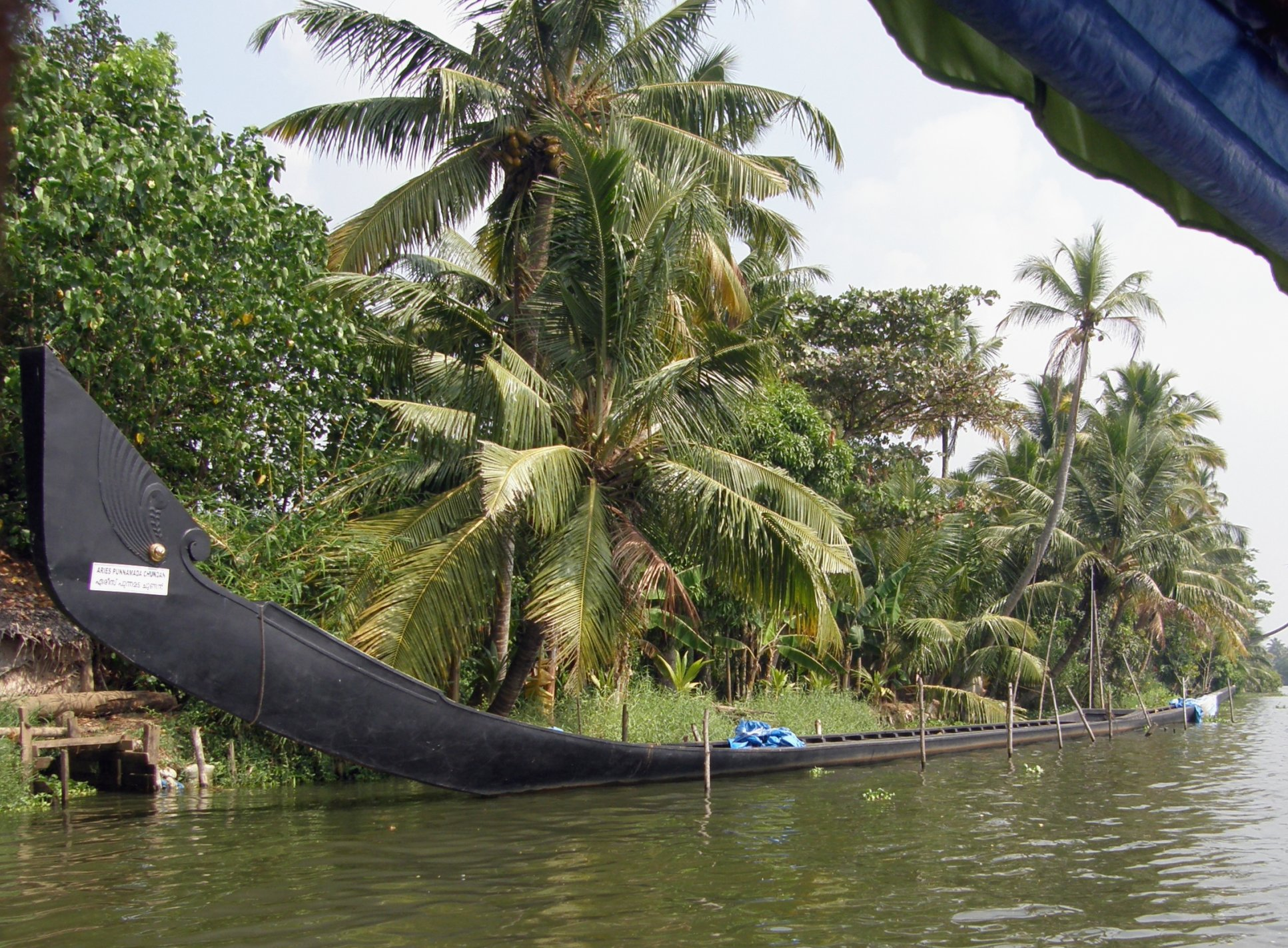 Snake Boats of Kerala.